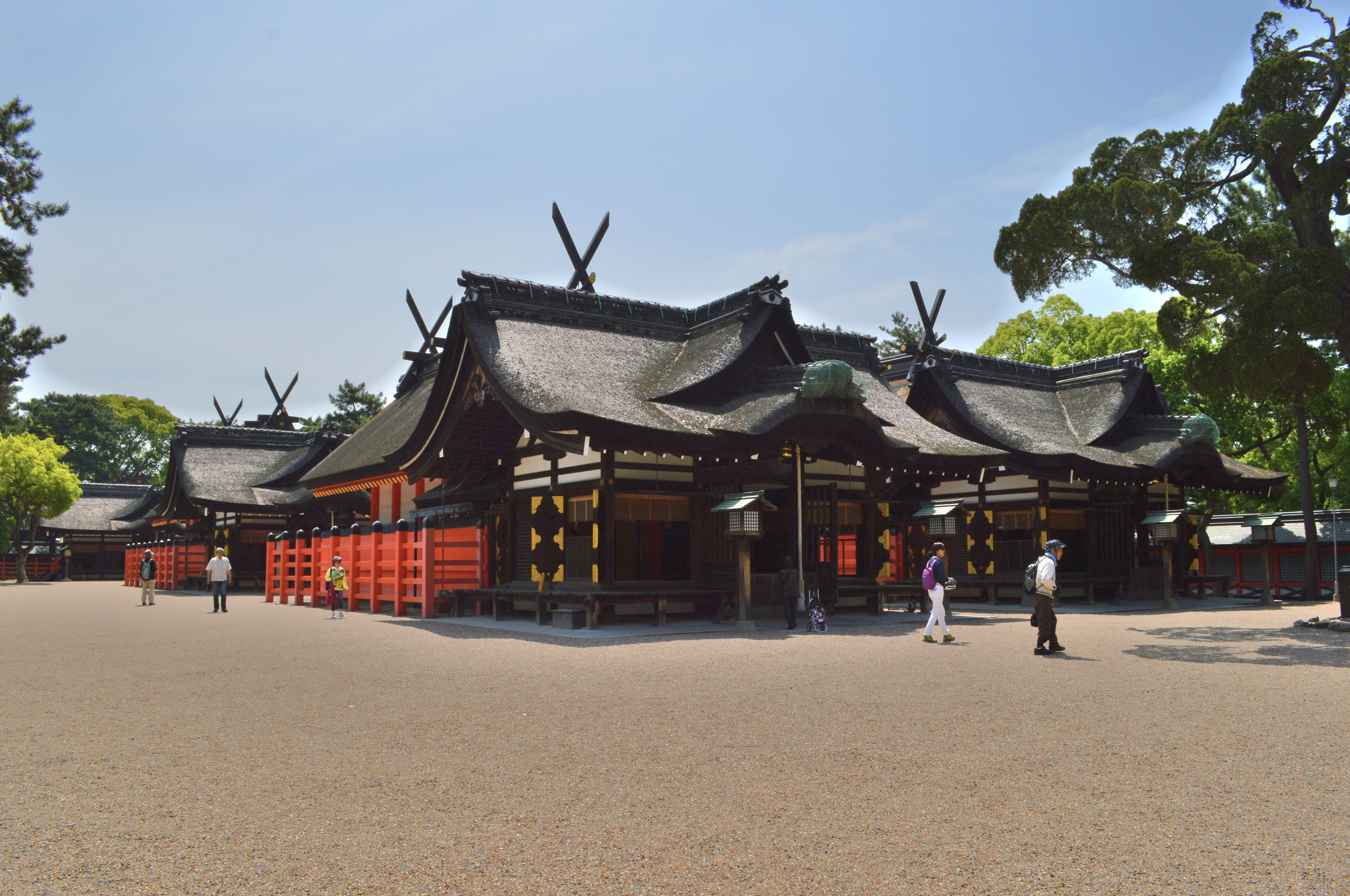 住吉大社 境内